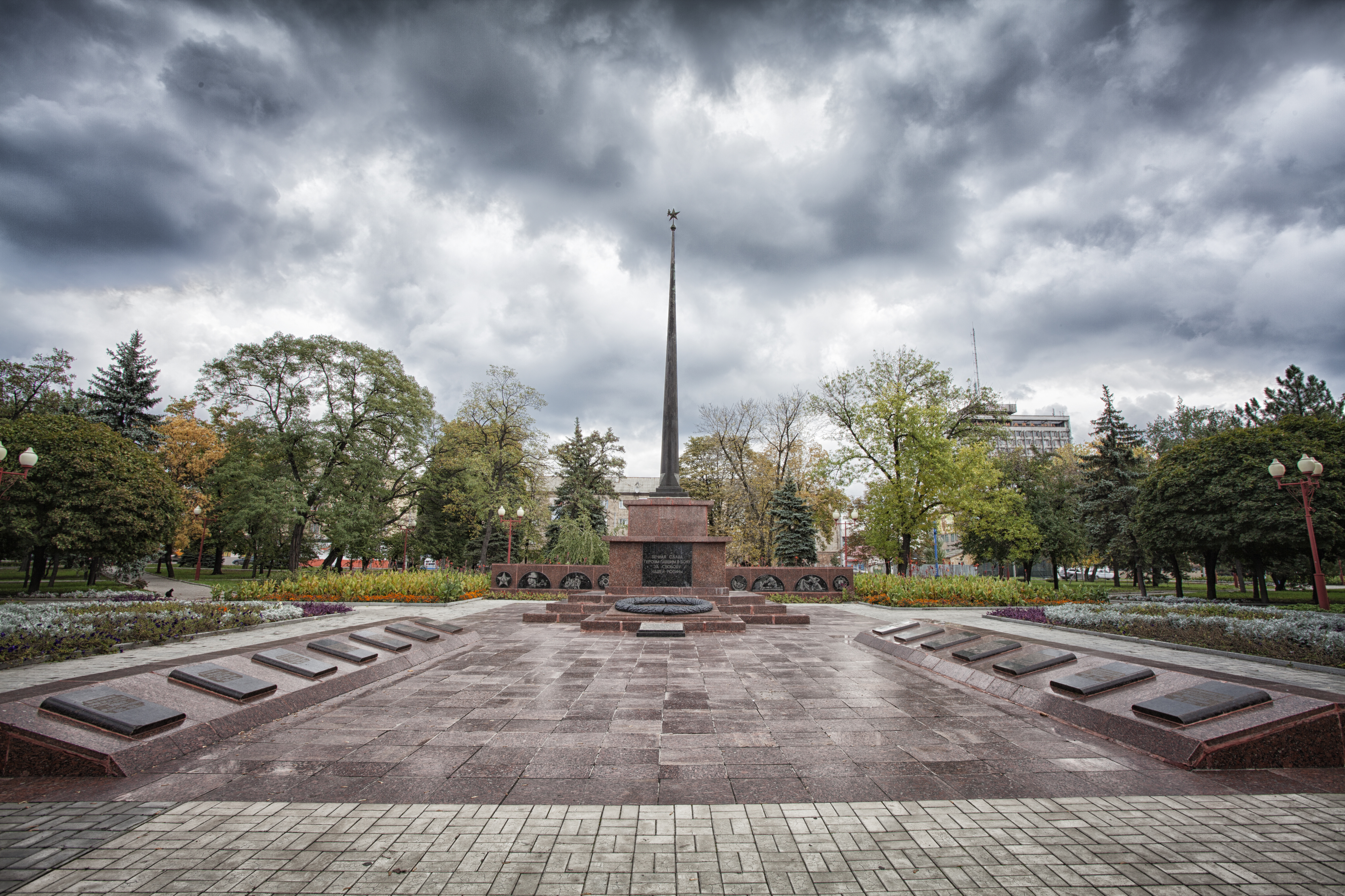 Братська могила радянських воїнів Південного фронту., Макіївка, Центрально-Міський р-н, пр. Леніна, 56